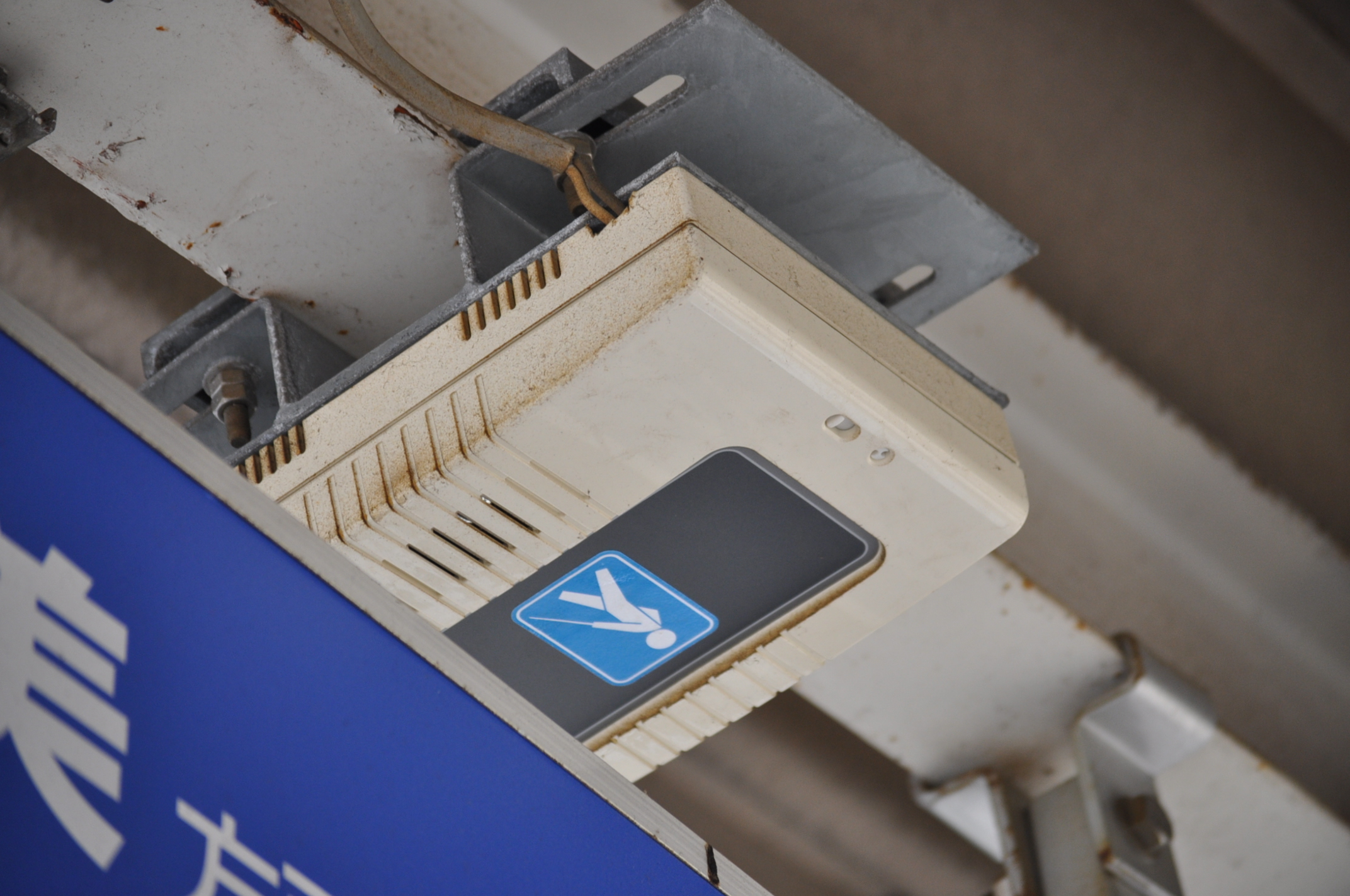 JR九州香椎駅に設置されている盲導鈴。